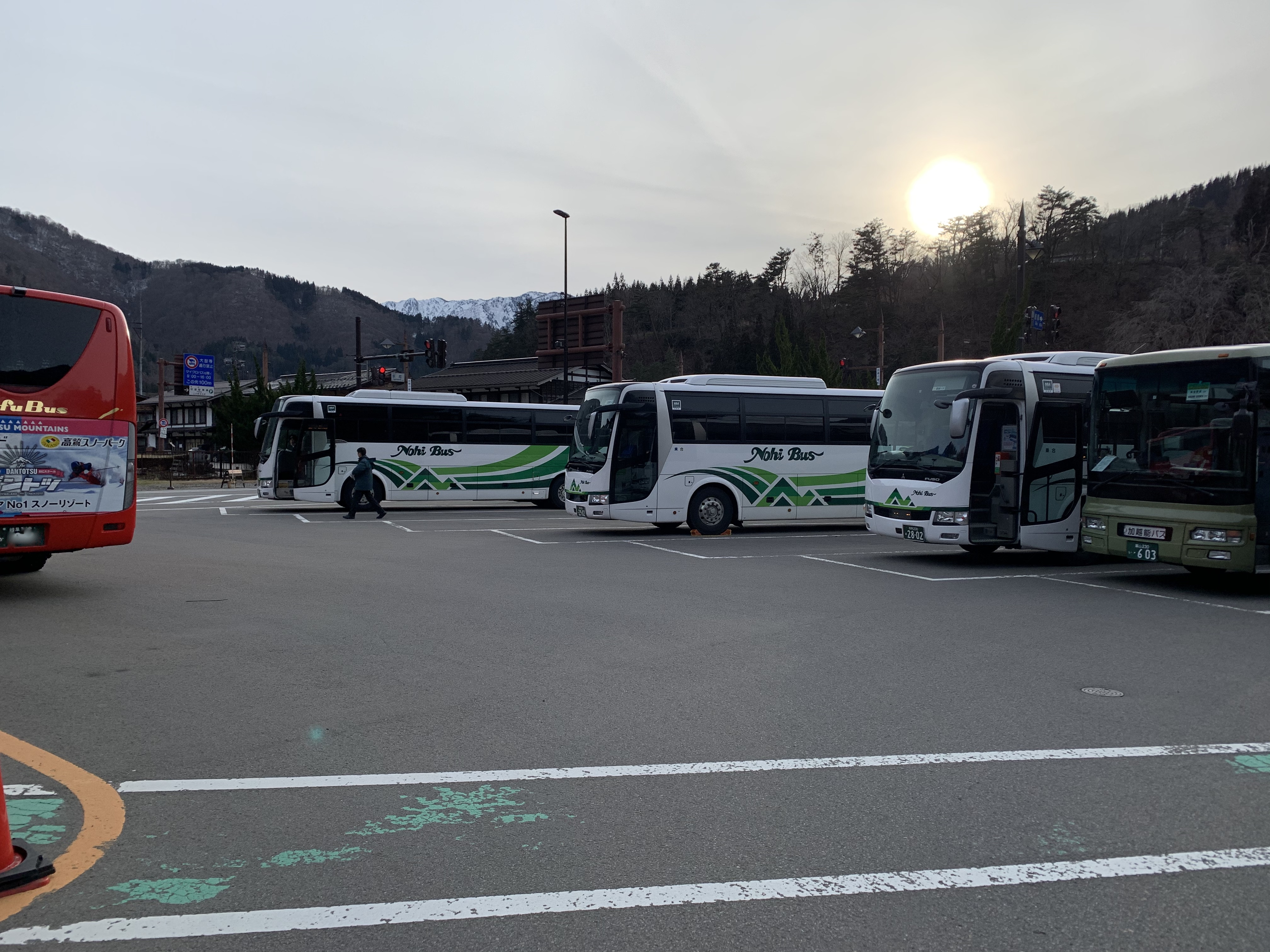 白川鄉巴士總站景觀。